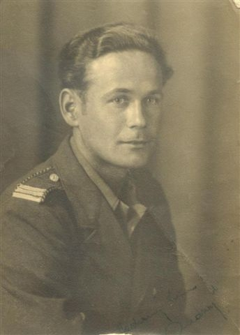 Stanisław Dutkiewicz 1915-1965